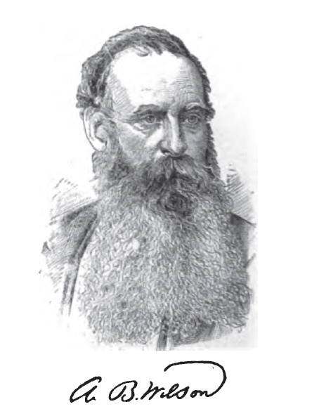 Allen Benjamin Wilson